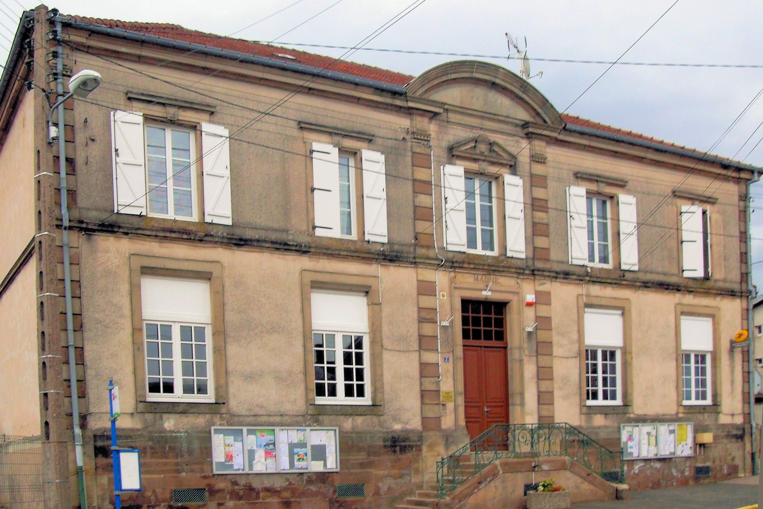 La mairie-école de Pexonne